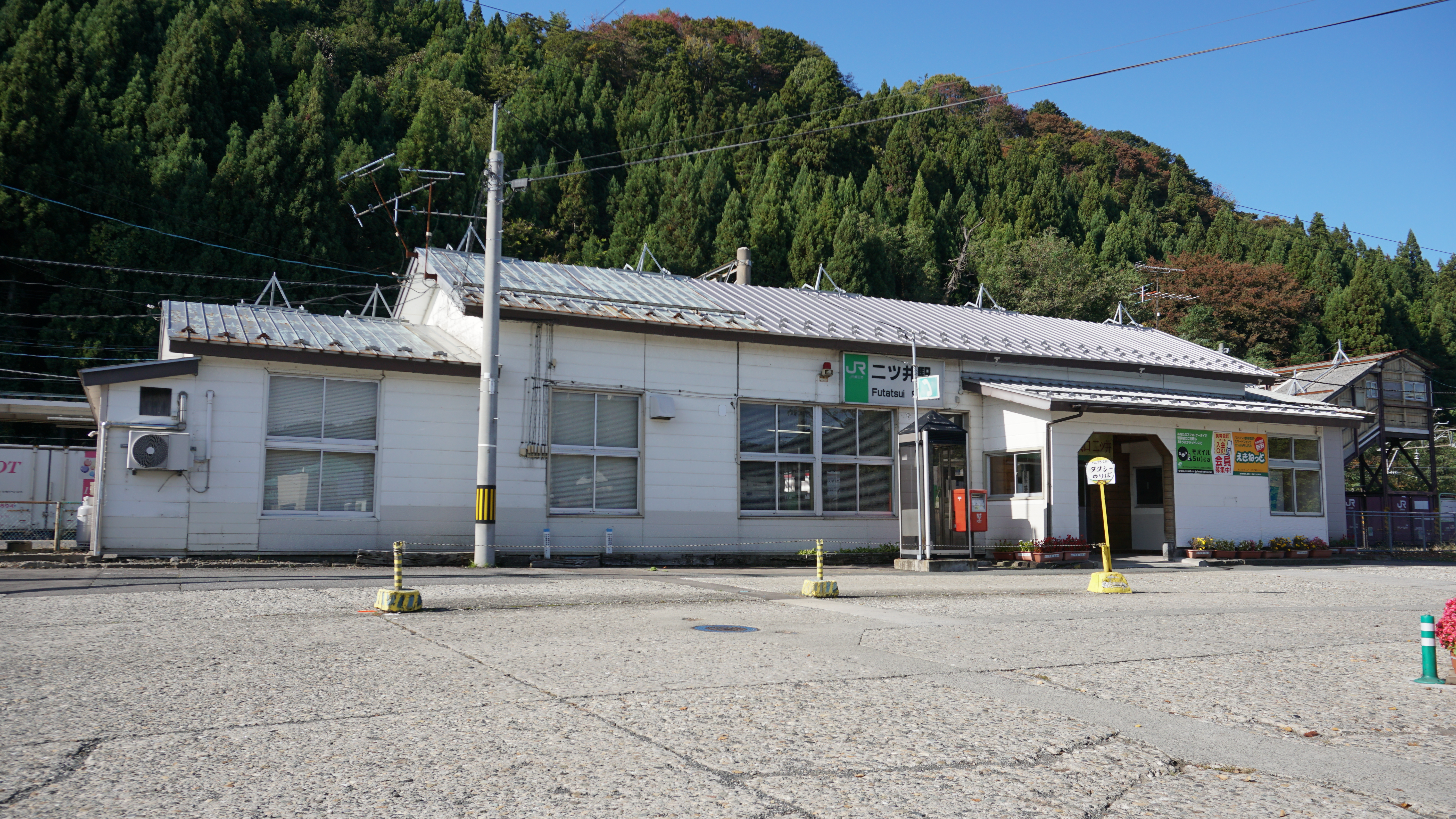 奥羽本線 二ツ井駅（秋田県能代市）